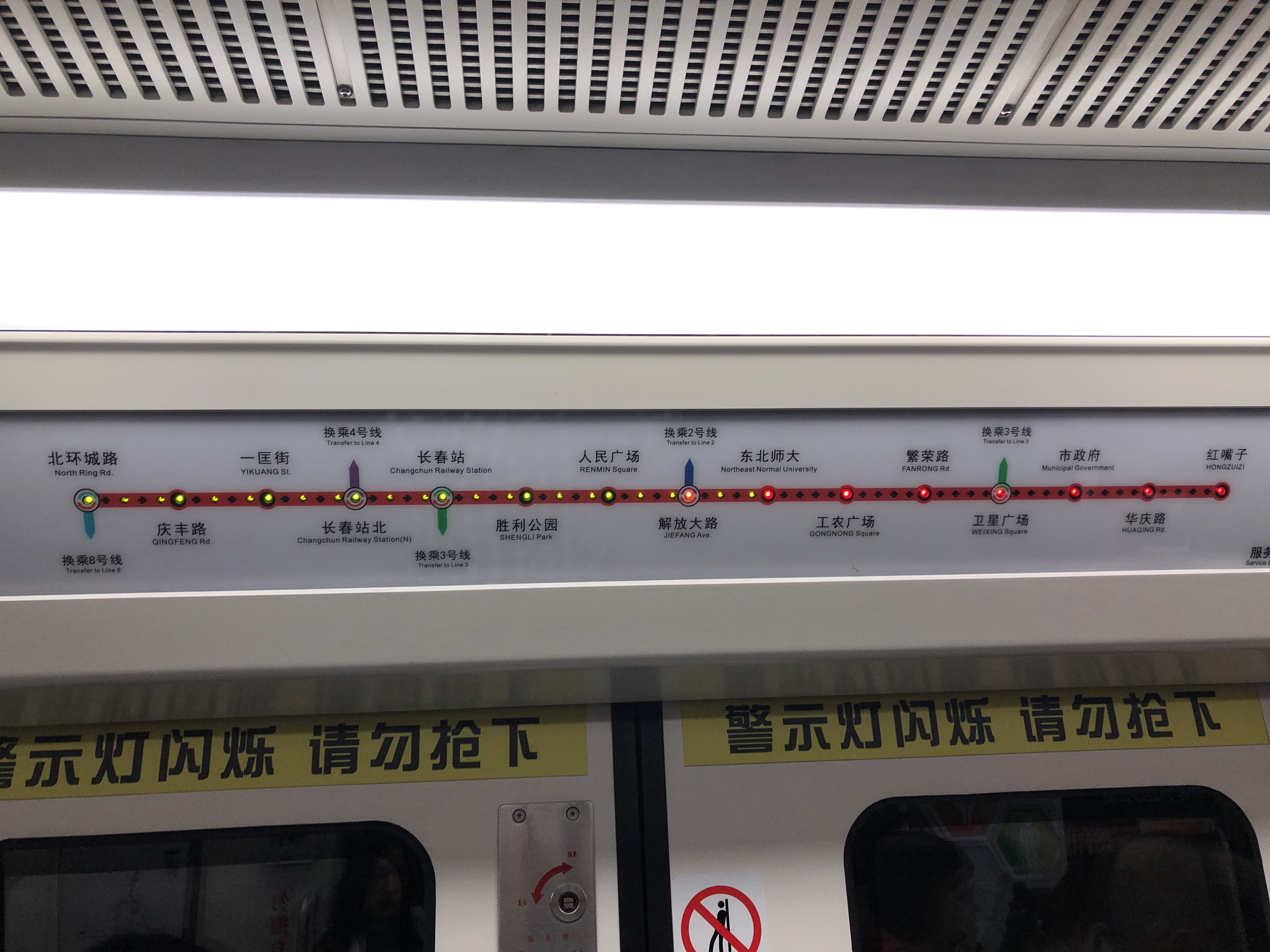 中文（中国大陆）: 新长春轨道交通一号线车内指示牌，对英文站点名称及换乘标志进行了更正。